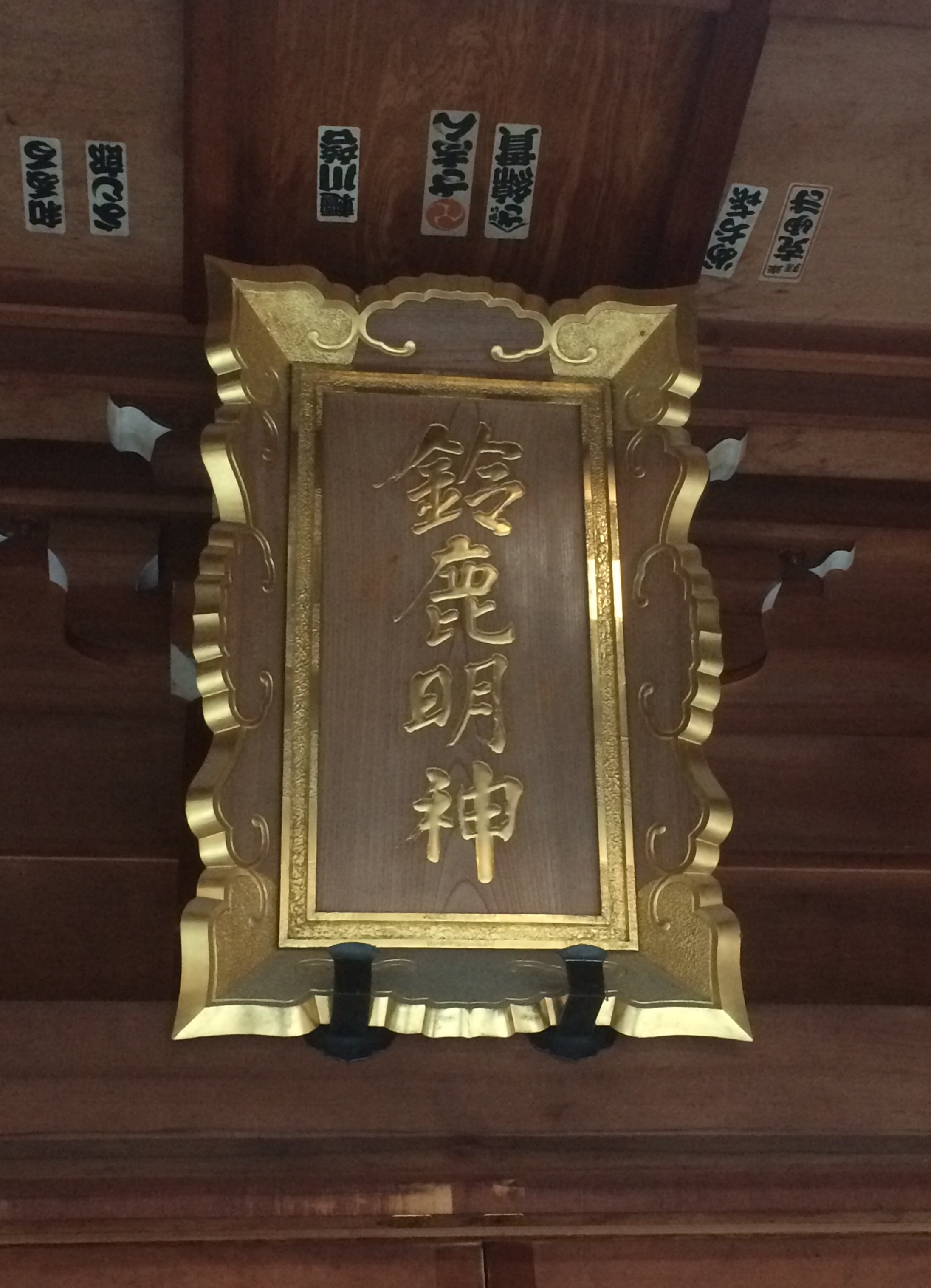 神奈川県座間市入谷に鎮座する鈴鹿明神社の拝殿社額。